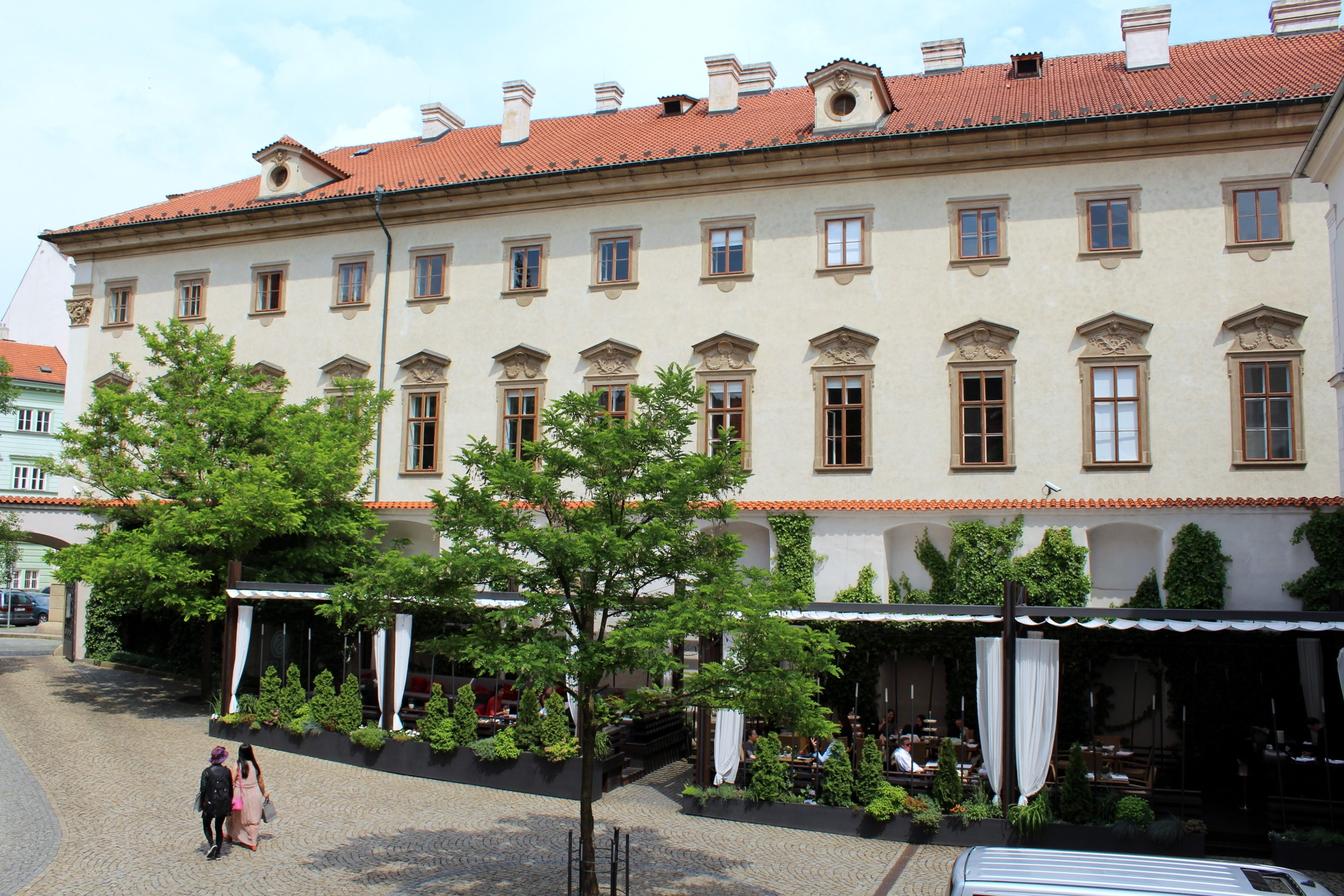 Dominikánský klášter na Malé Straně v Praze